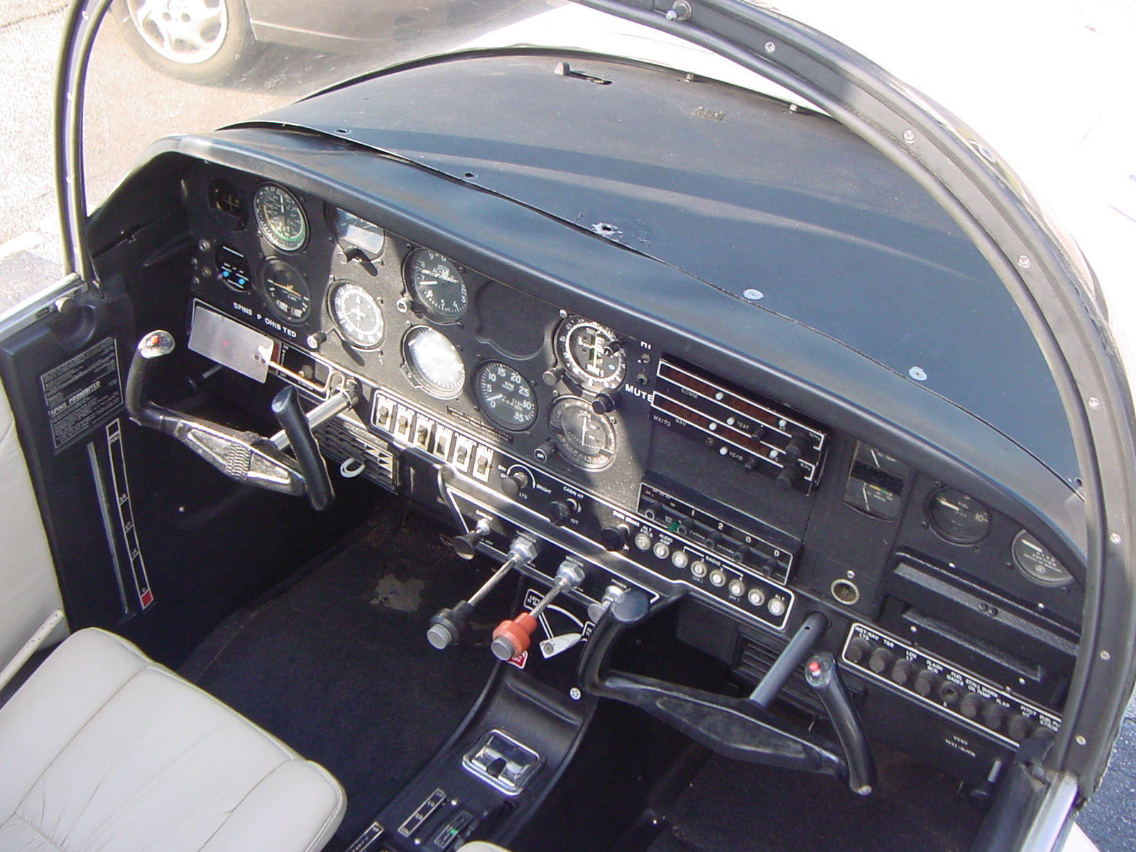 Plane Instrument Panel